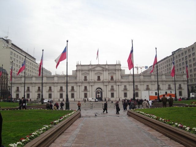 Plaza de la Constitución EN Santiago's Plaza de la Constitución image, by Der schöne Tod. Any copyright is needed because it was taken by the owner. FR Image de la Plaza de la Constitución à Santiago, Chili. On a pas besoin de copyright à cause de que la photo était du propietère, Der schöne Tod ES Foto de la Plaza de la Constitución de Santiago de Chile, tomada por Der schöne Tod